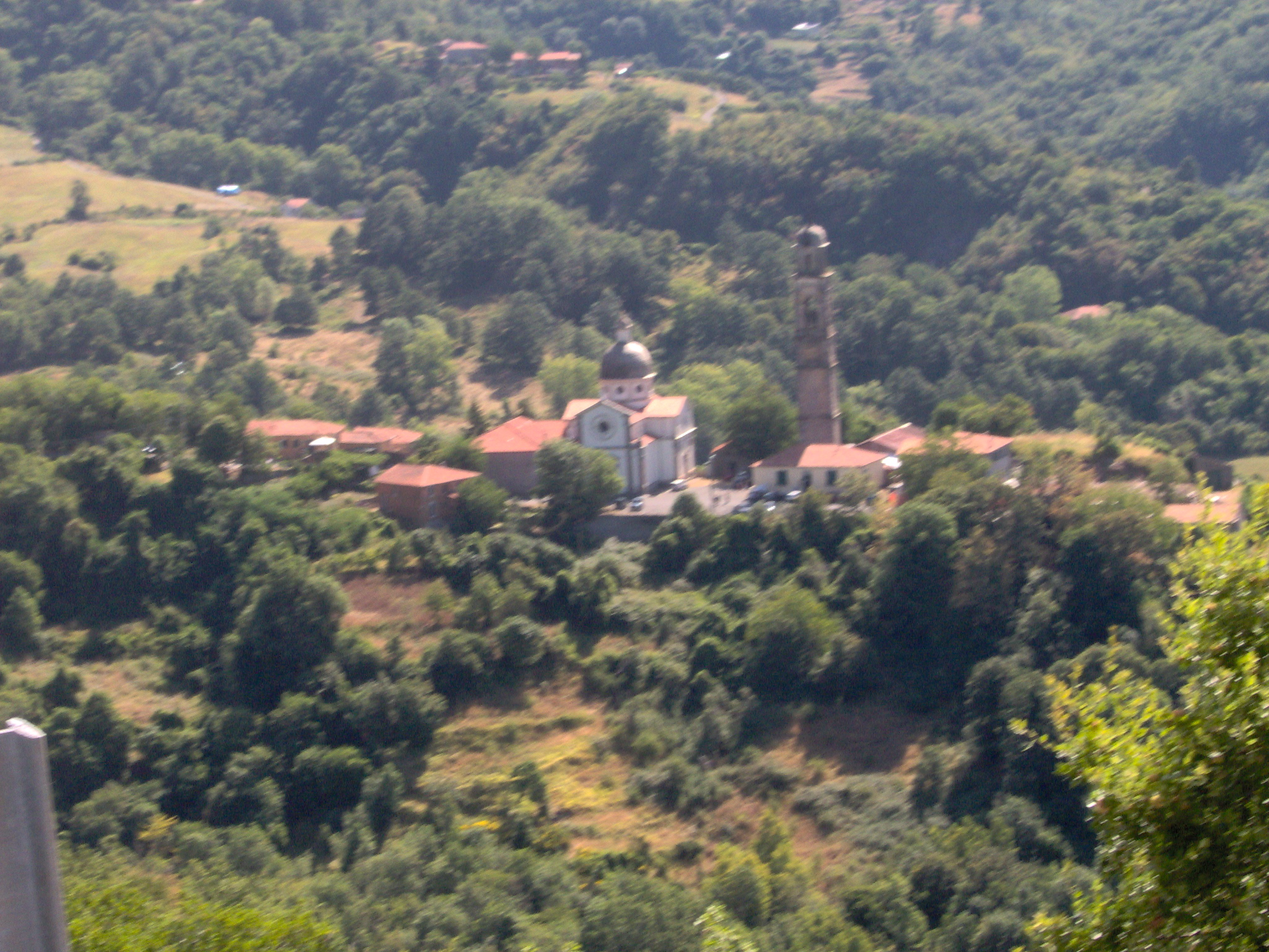 Caranza fraz. di Varese Ligure